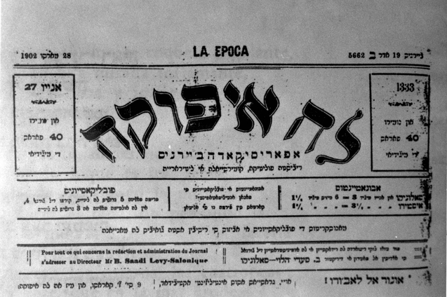 Главата на вестник "Епока" (1875 - 1912).